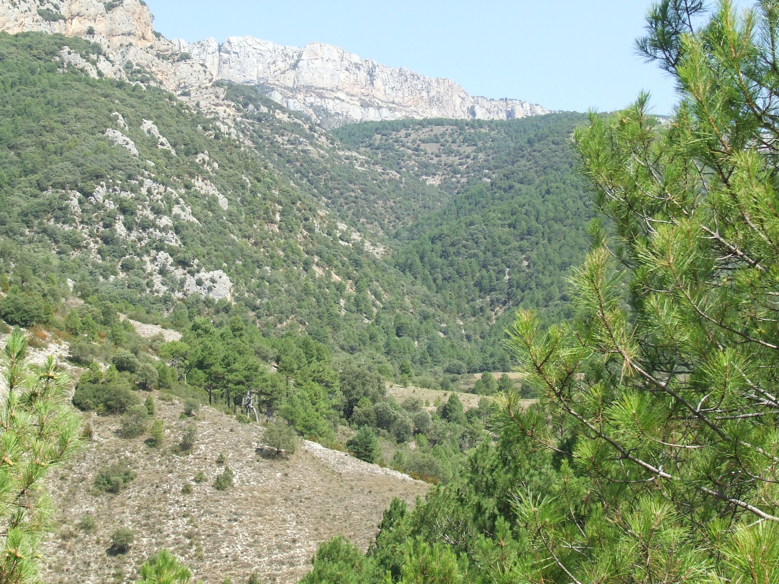 Barranc de Cal Palateres (Abella de la Conca, Pallars Jussà)